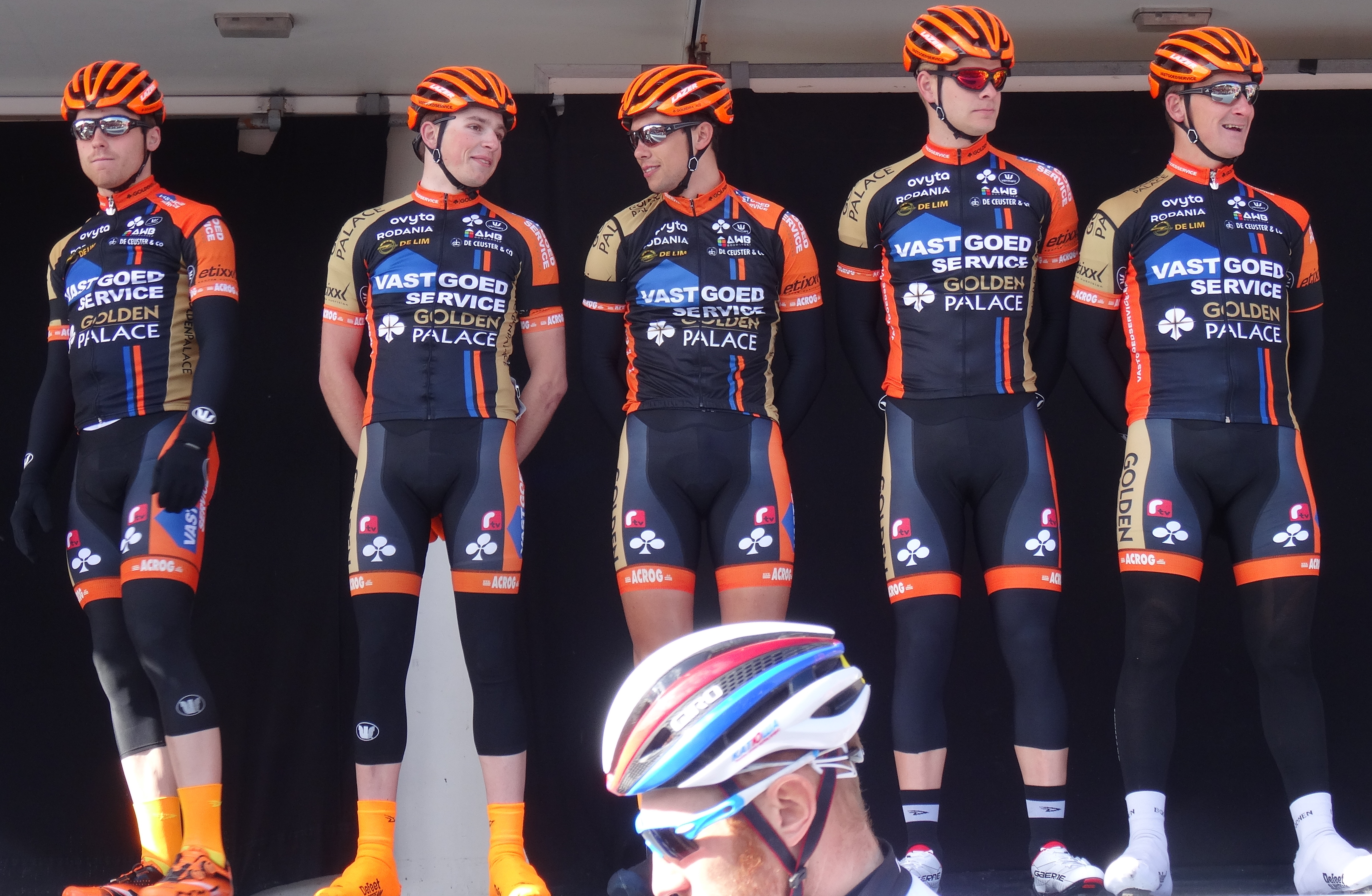 Reportage réalisé le mercredi 4 mars à l'occasion du départ du Samyn des Dames 2015 et du Samyn 2015 à Quaregnon, Belgique.